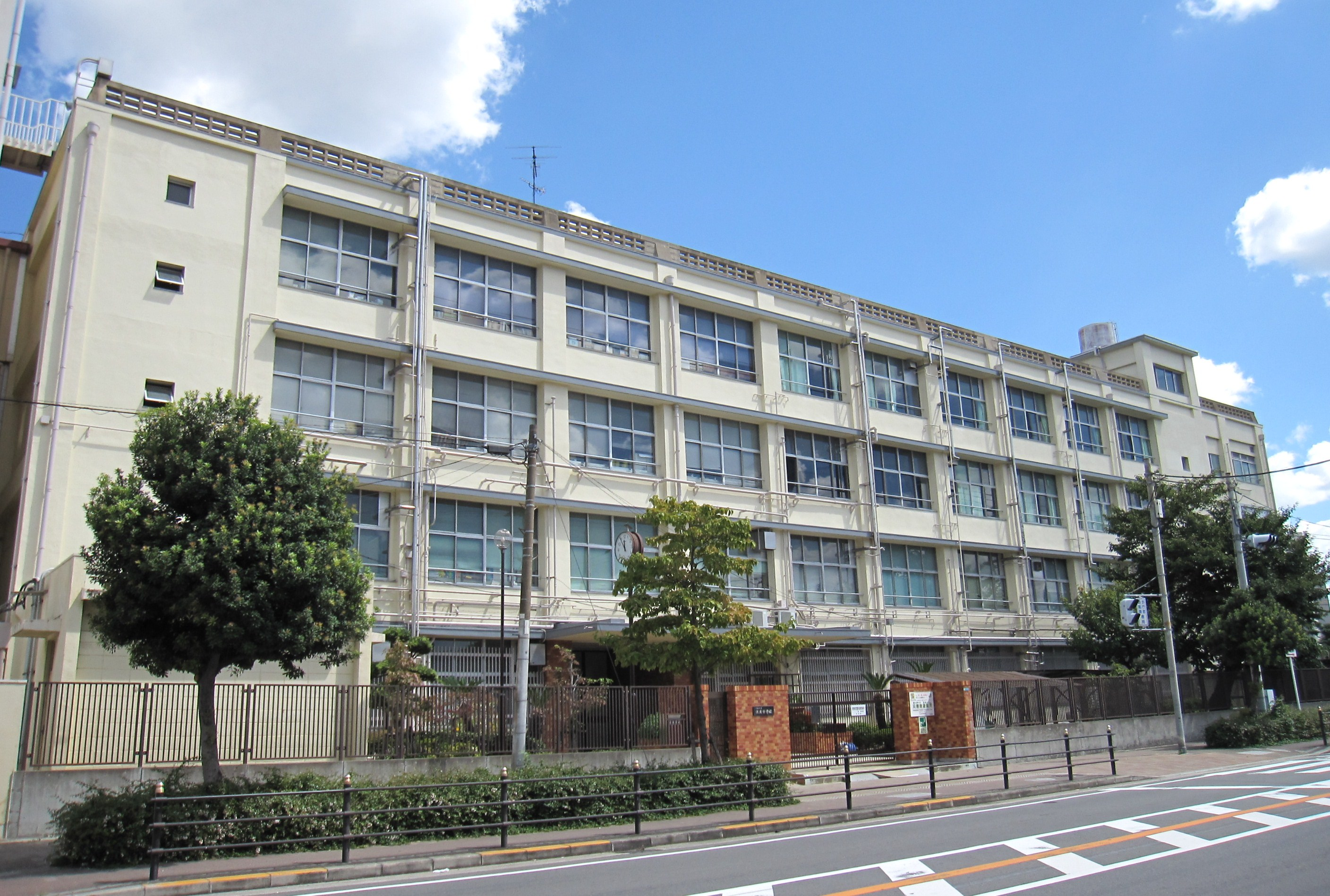 大阪市立港南中学校